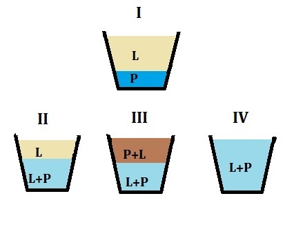 I Polümeeri P lahustumine vedelikus L; II Lahusti L pundumine polümeeris P; III Kahefaasiline süsteem - pundunud polümeer L+P ja polümeeri lahus P+L; IV Polümeeri täielik lahustumine lahustis